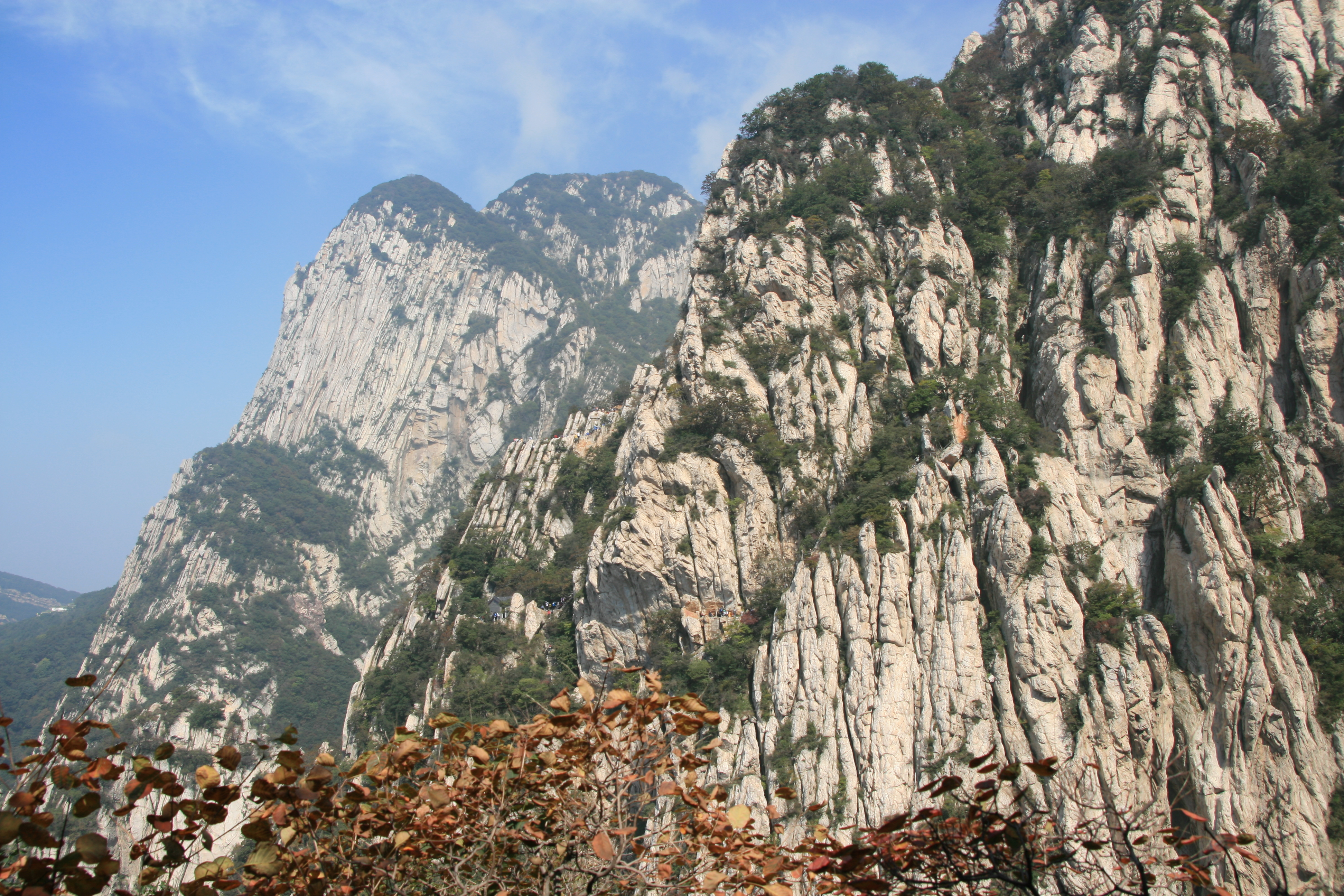 嵩山胜景